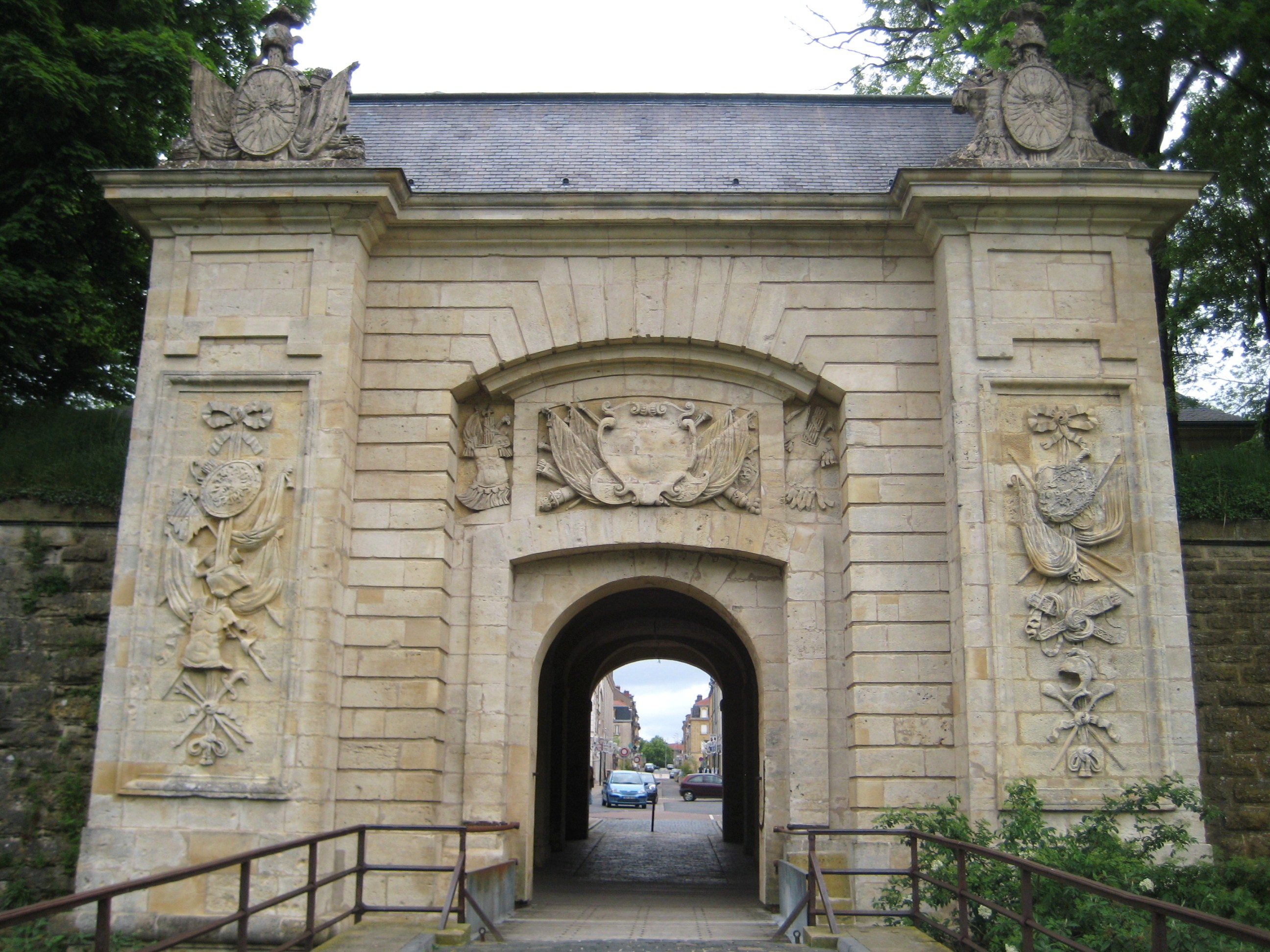 Description Porte de France Date16 May 2009Sourcemon appareil photoAuthorAimelaime Porte de France